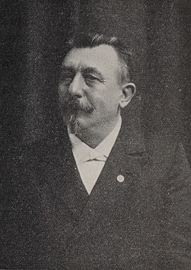 Portreto de Amatus Van der Biest-Andelhof, belga esperantisto.